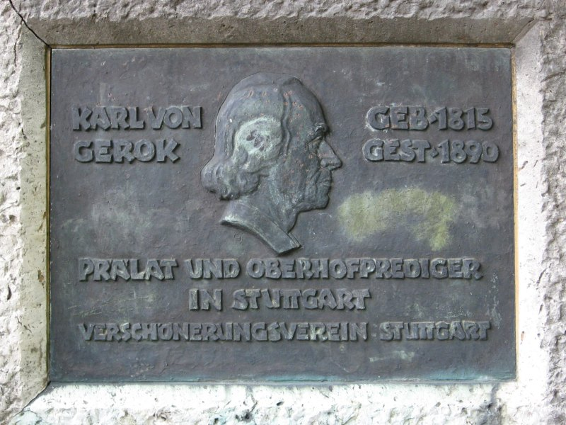 Karl-Gerok-Gedenkplatte am Aussichtspunkt Geroksruhe in Stuttgart-Ost, Pischekstraße (September 2006) eigenes Foto / alle Rechte freigegeben